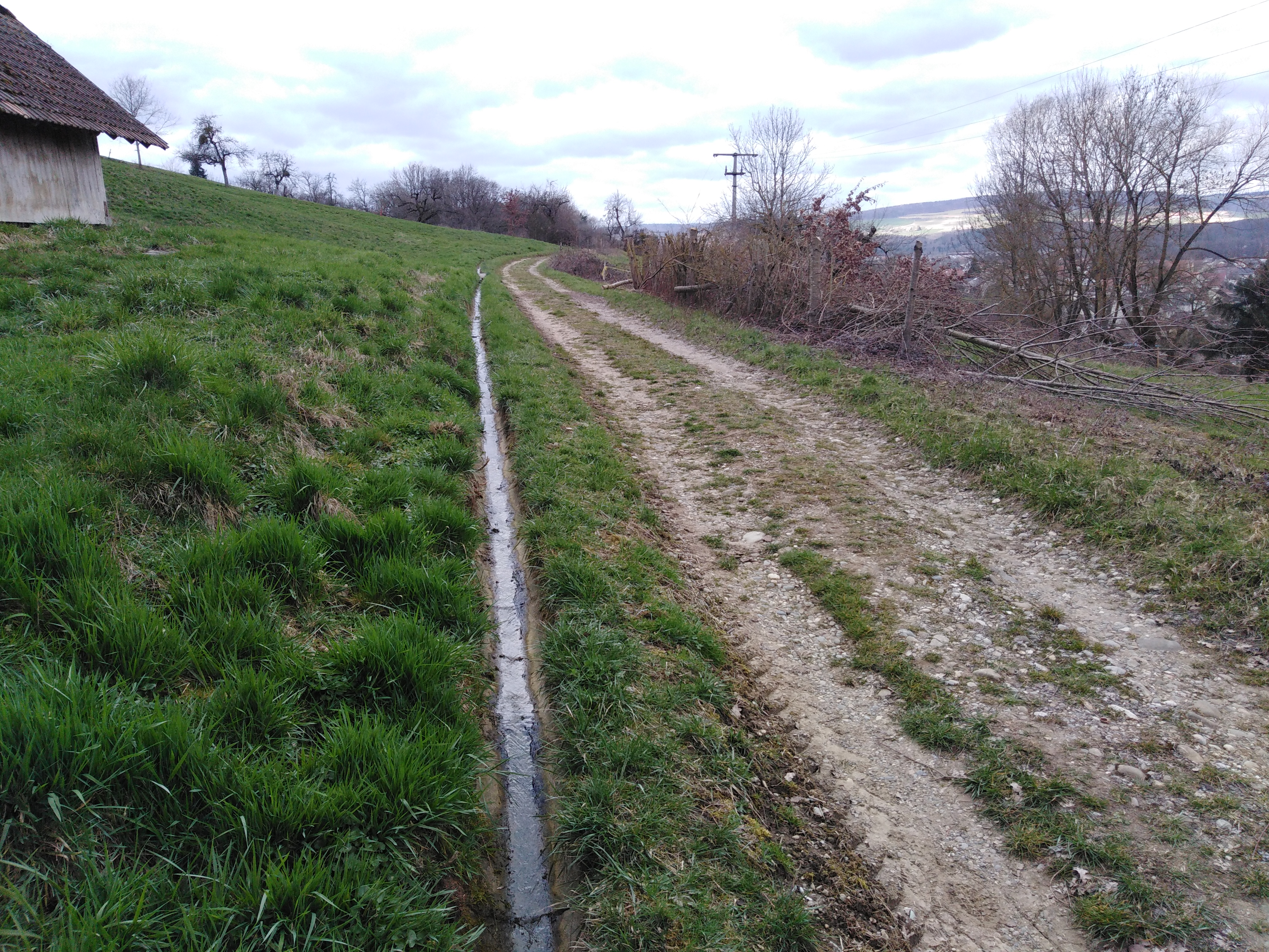 Lauchringen, Gemeinde im Landkreis Waldshut in Baden Württemberg. Oberer Talweg, ehemalige Römerstraße vom Gutshof bei Grießen, vorbei am Gallo-Römischen Tempel vor der Küssaburg oberhalb Oberlauchringens (Fortsetzung unklar).